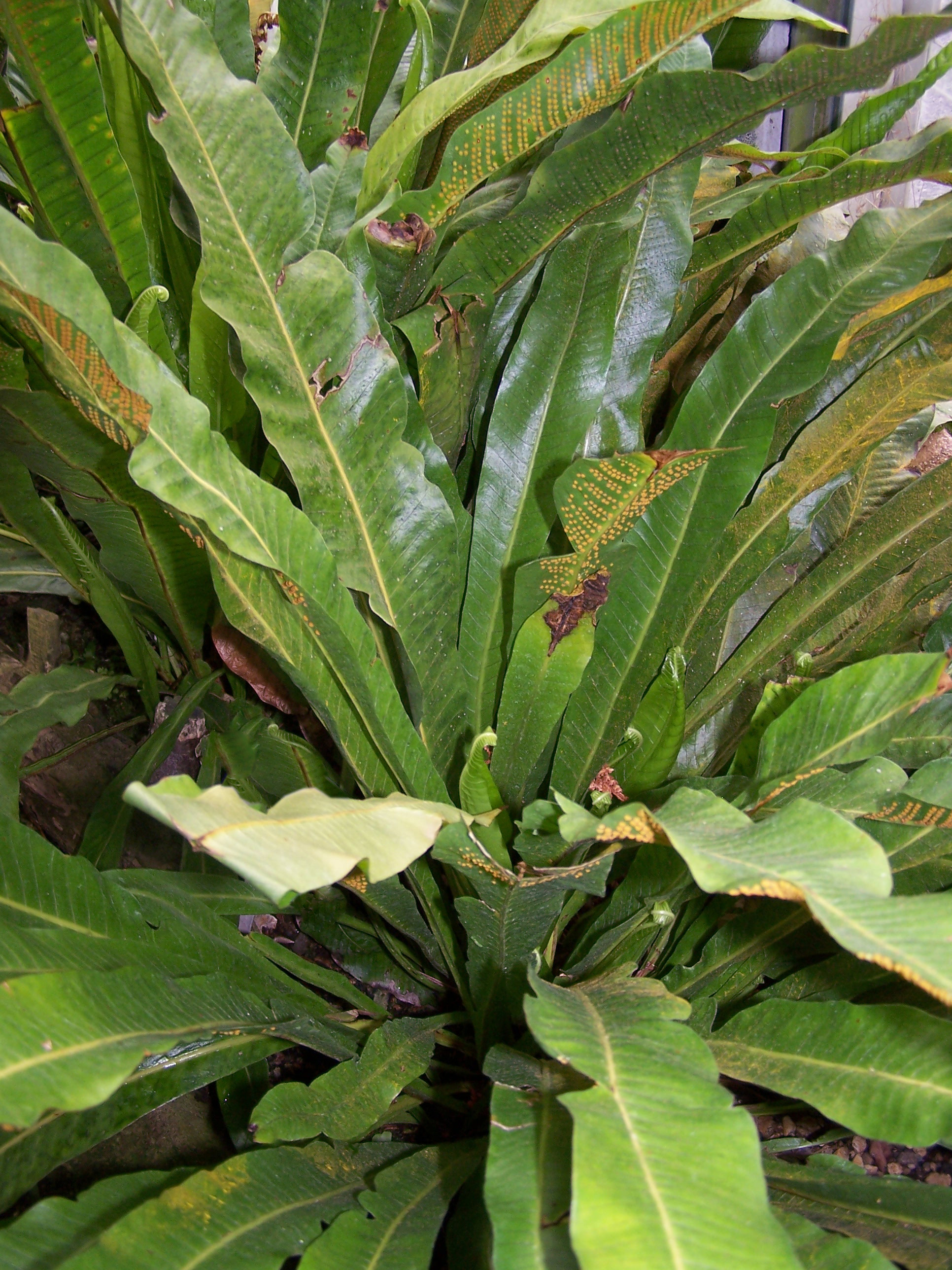 Campyloneurum phyllitidis 17 juin 2006 Vieux jardin botanique de Göttingen